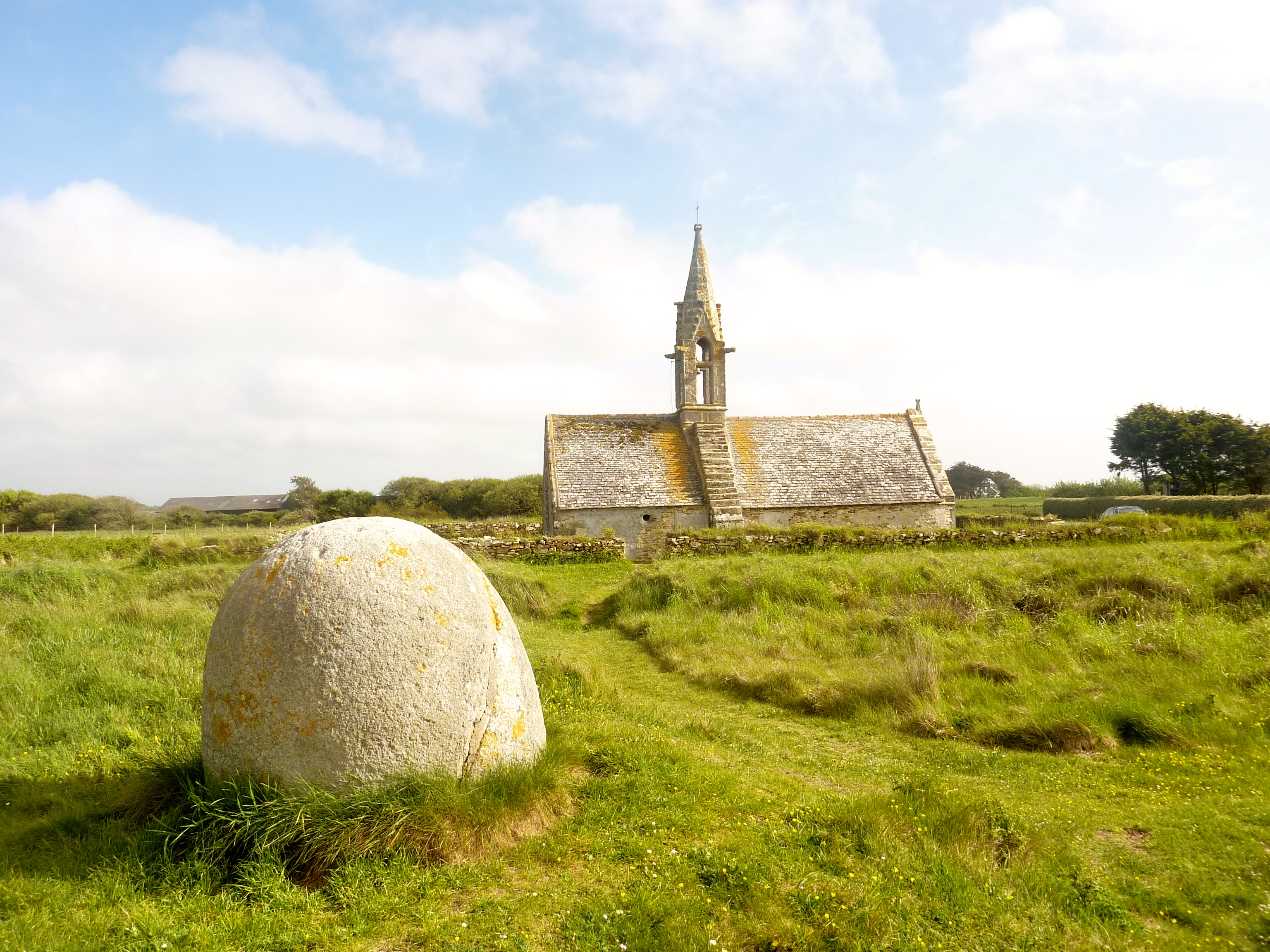 Tréguennec : la chapelle Saint-Vio et la stèle hémisphérique à cupules, datant de l'Âge du Fer, située à proximité